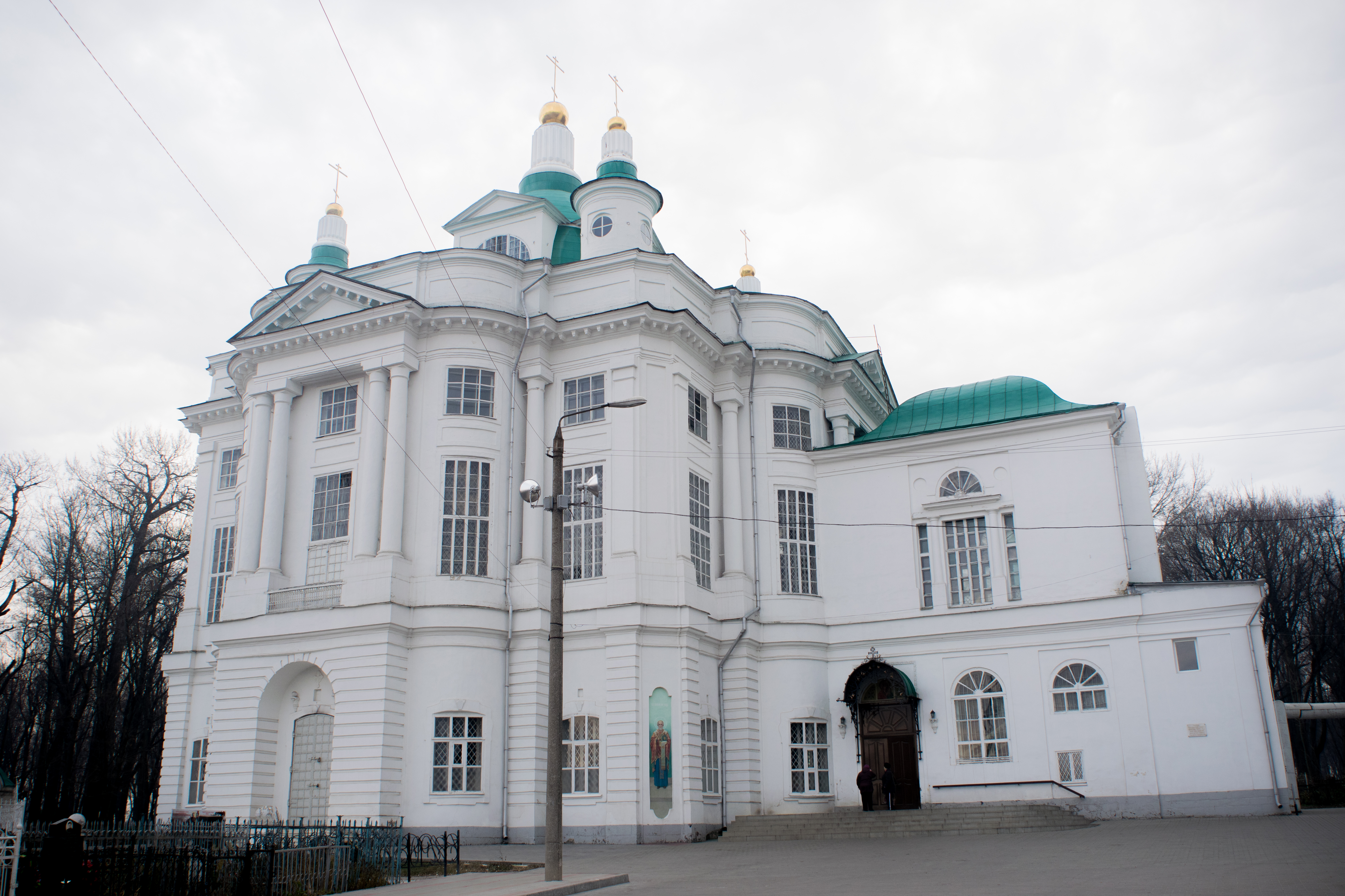 Церковь Всех Святых (собор Всехсвятский) (Тульская область, Тула, Льва Толстого улица, 79 (лит. А, А[i], А[2]))